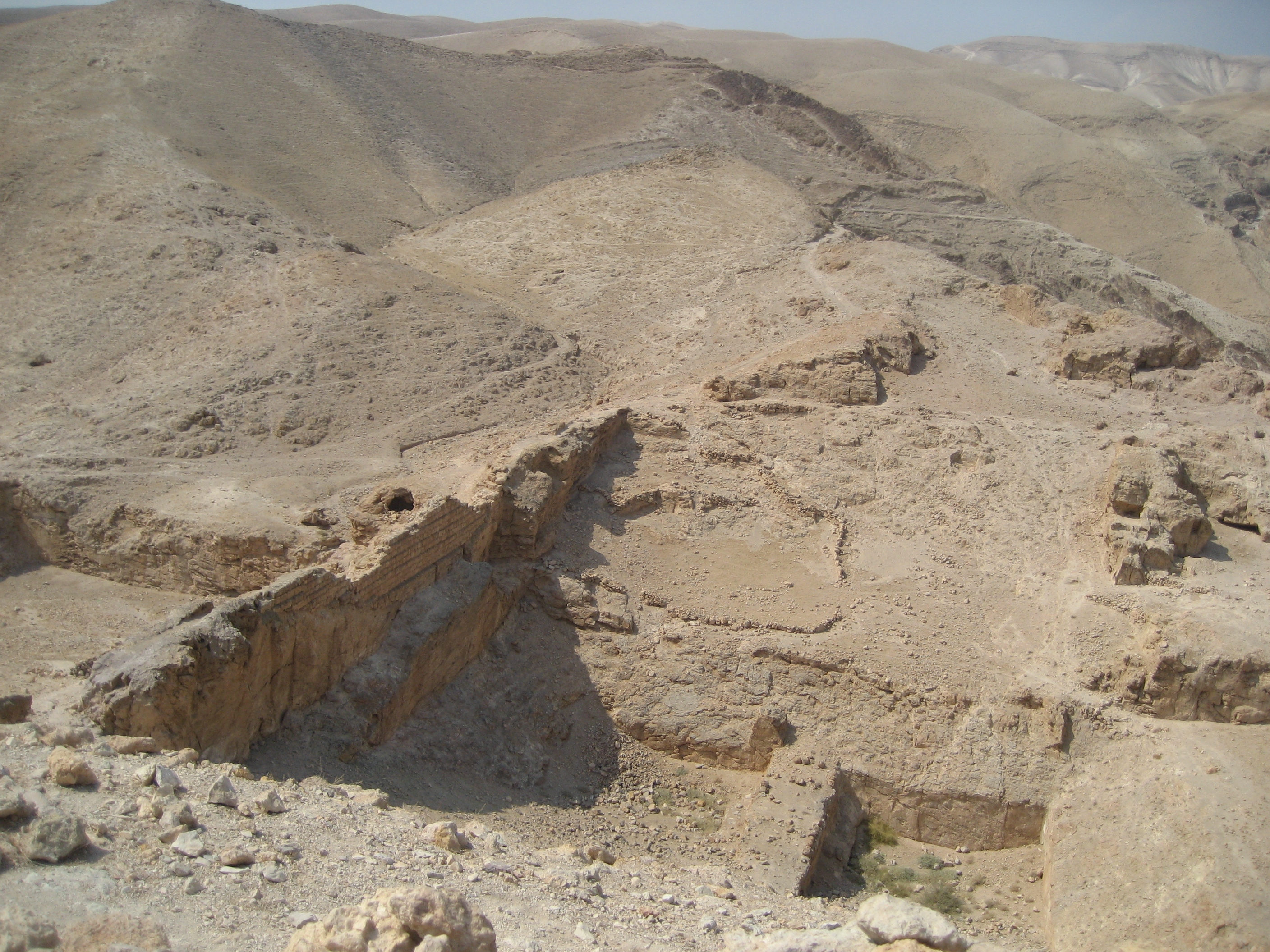 בריכות האגירה של מצודת הורקניה